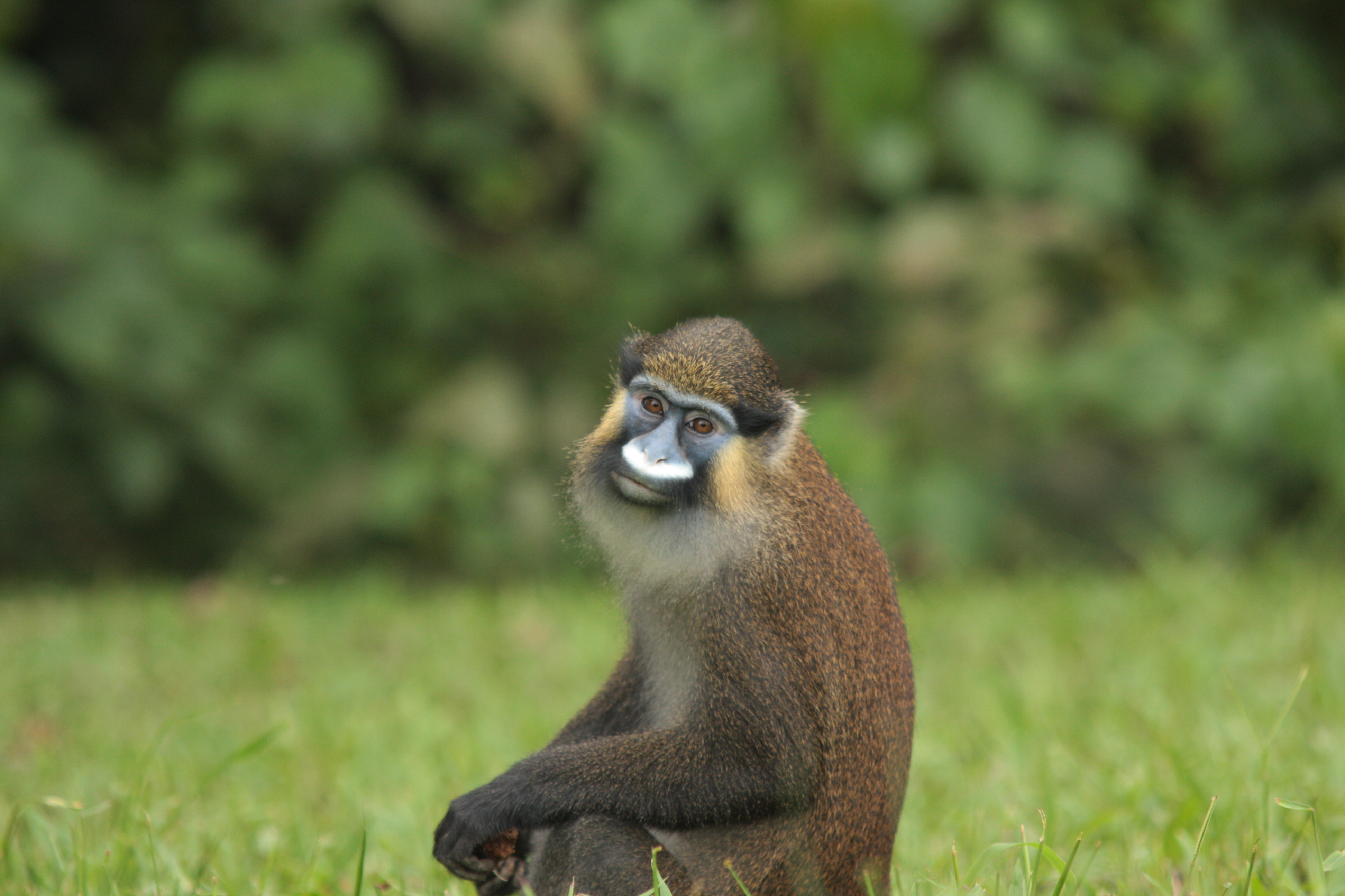 singe cercopithèque cephus, moustac, CIRMF, Gabon